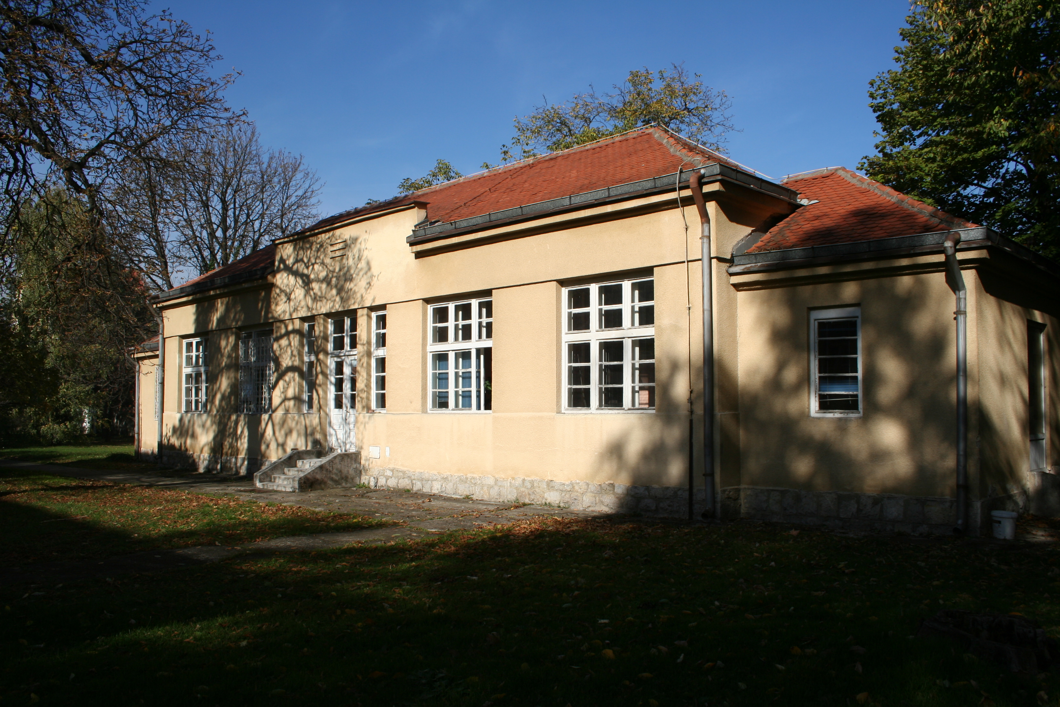 Zgrada ratne bolnice Valjevo